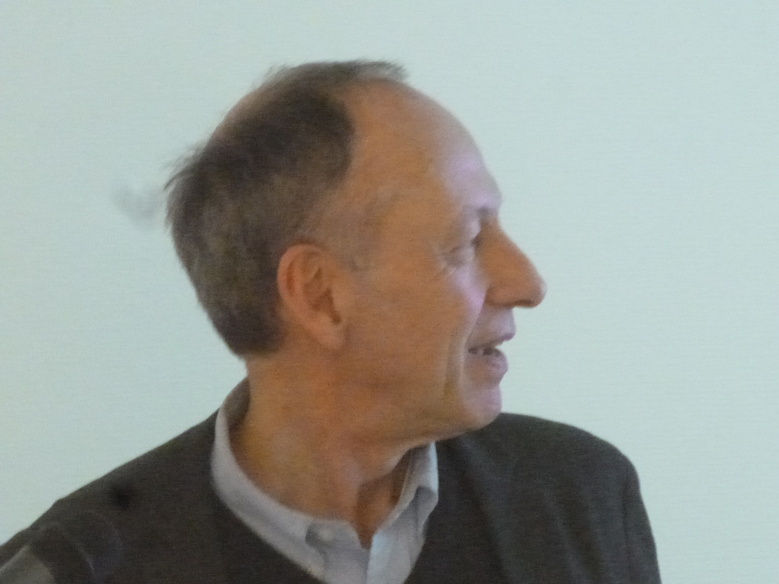 Ernst Piper 2019